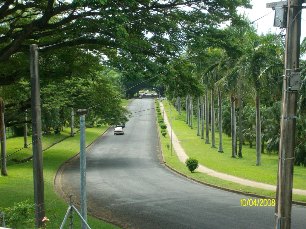 Simla Lautoka, taken from my porch